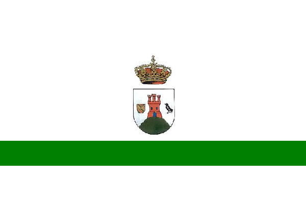 Bandera de Cuerva (Toledo)